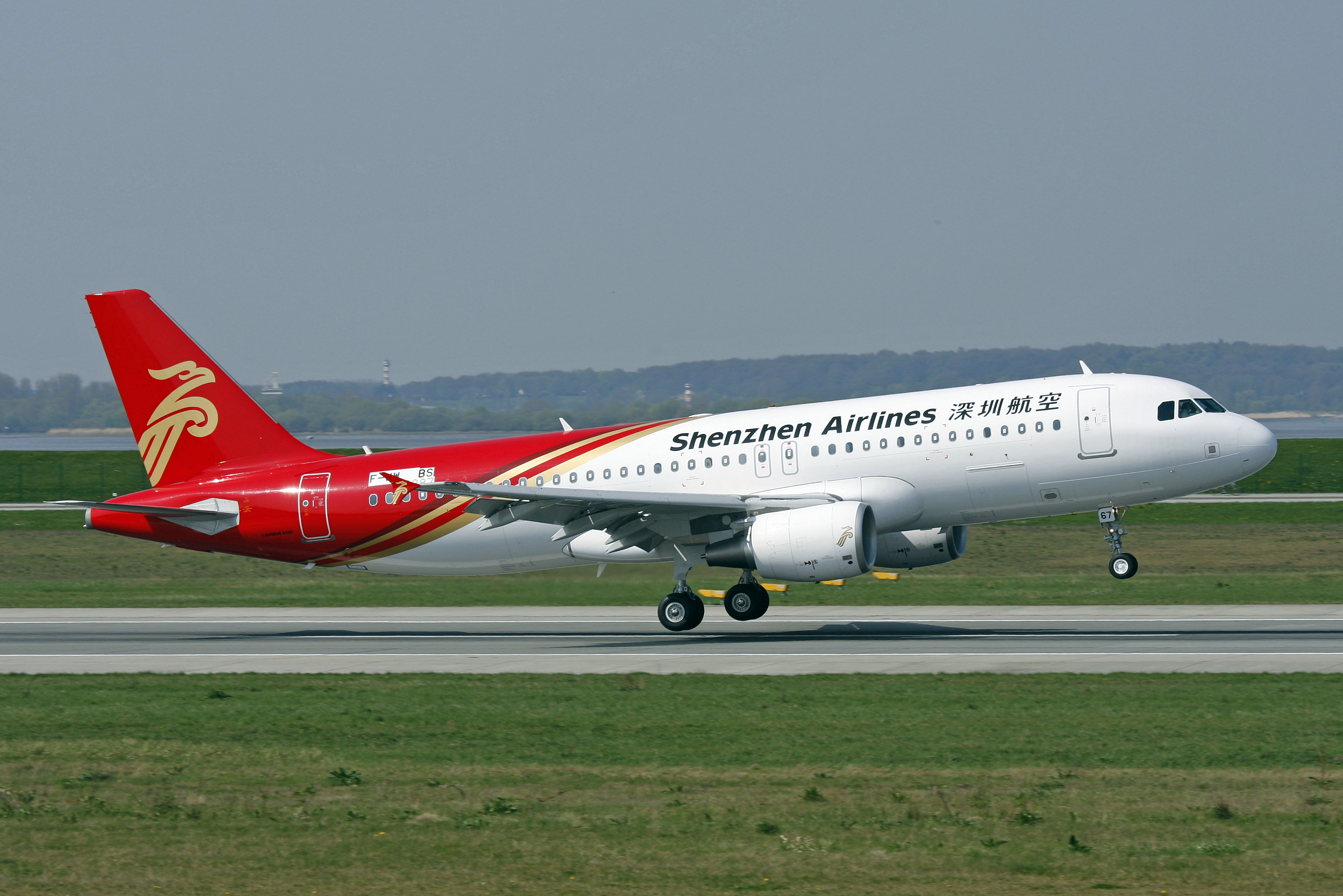 14-04-09 Aibusplant Finkenwerder